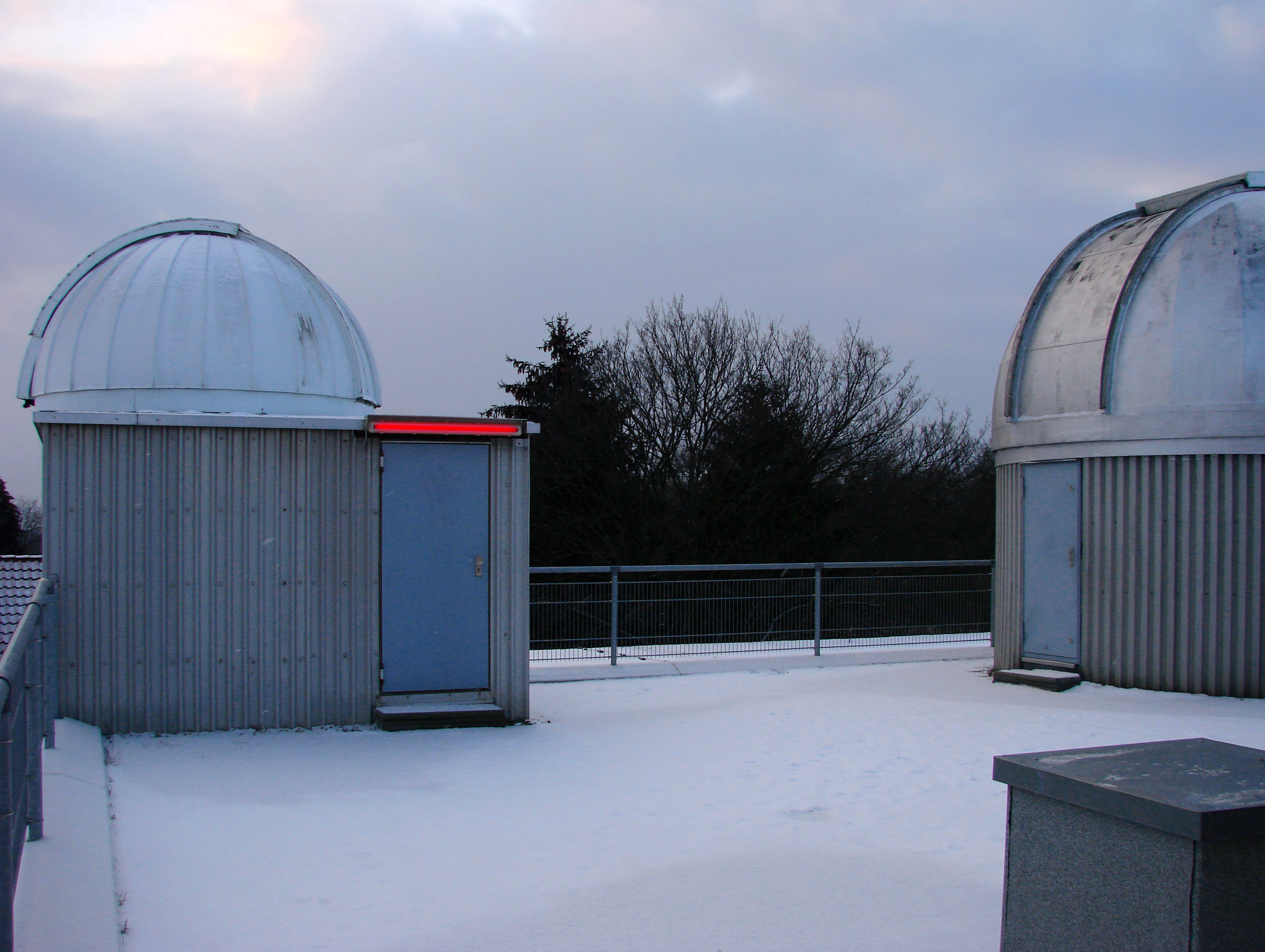 Zeigt die Kuppeln der Volkssternwarte Hannover.